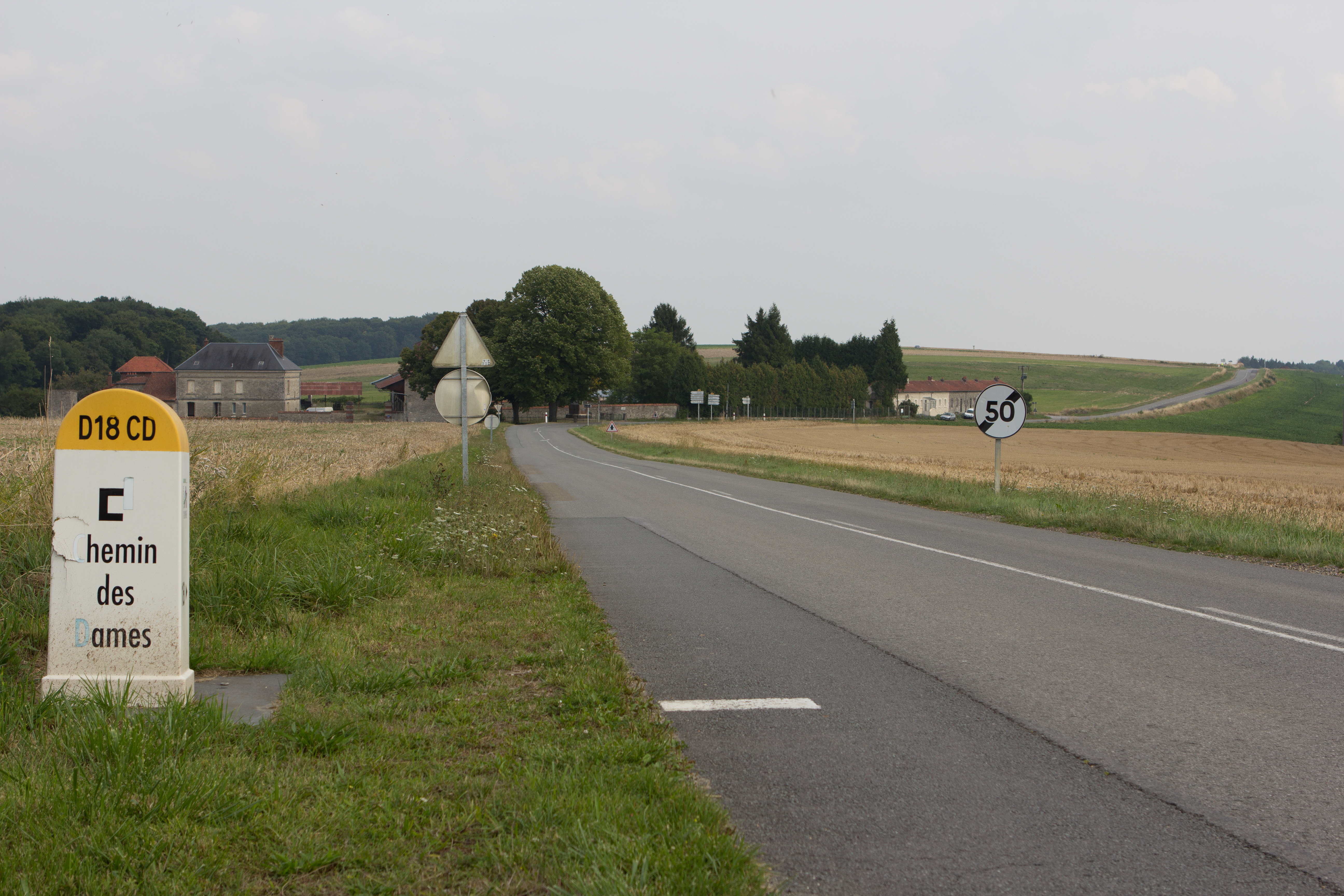 Le Chemin des Dames, au niveau de la caverne du Dragon, département de l'Aisnes, France